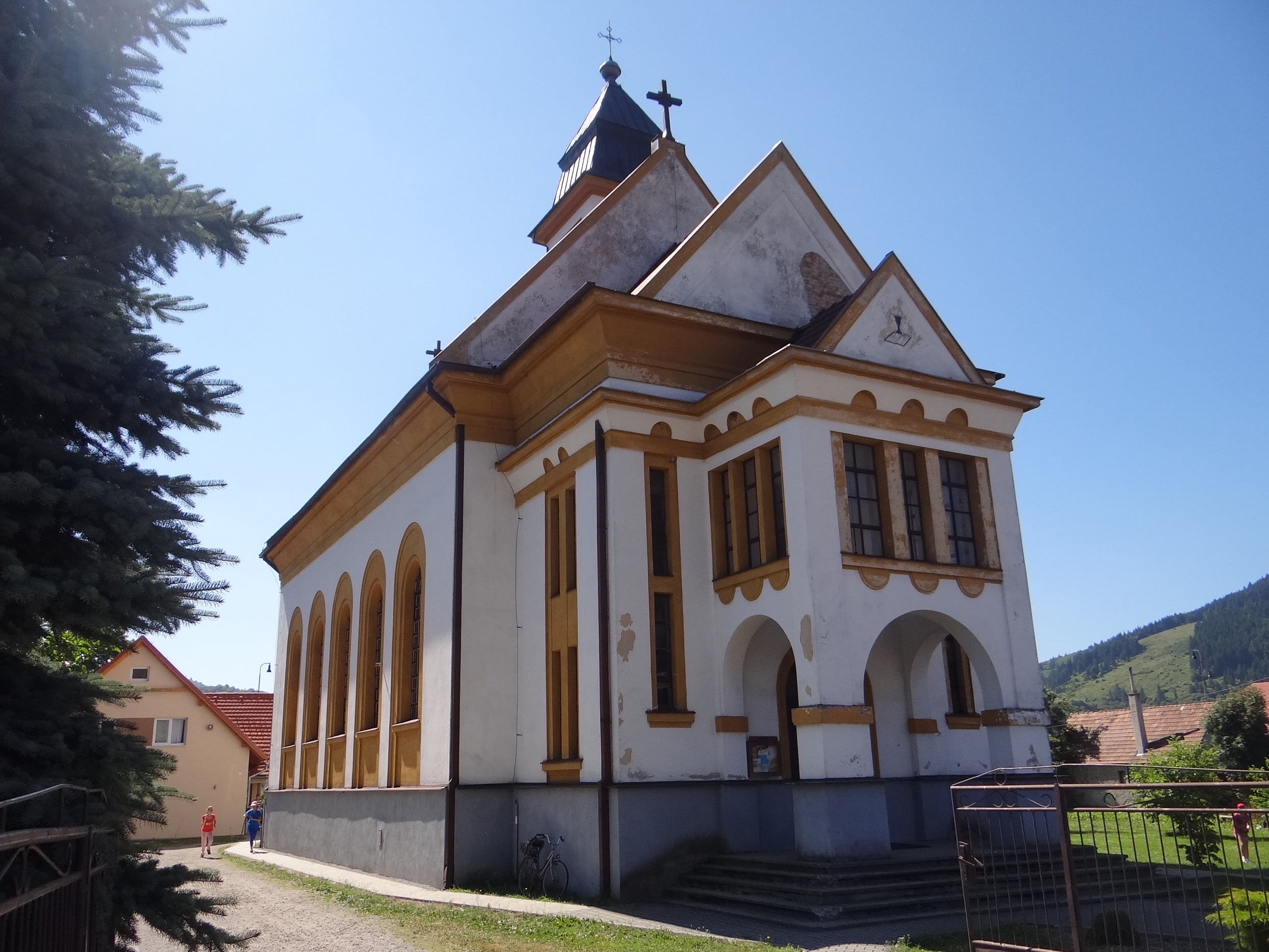 Párnica